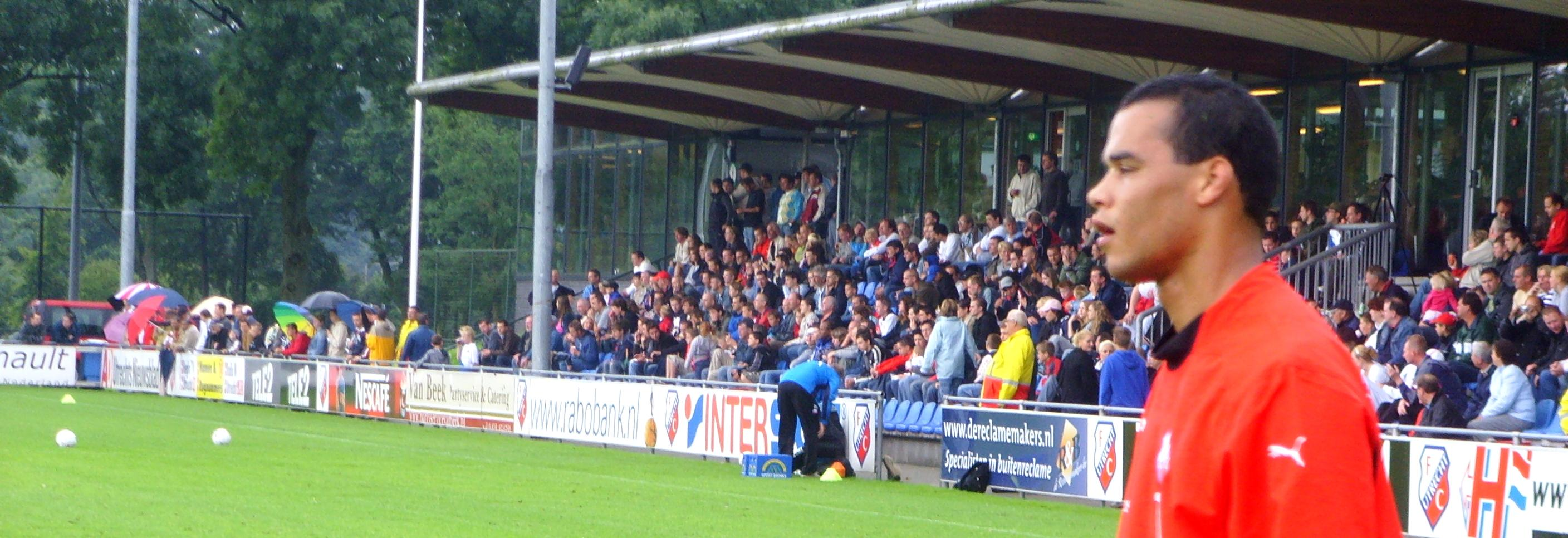 Michel Vorm in actie tijdens de eerste training van het seizoen 2008-2009 van FC Utrecht